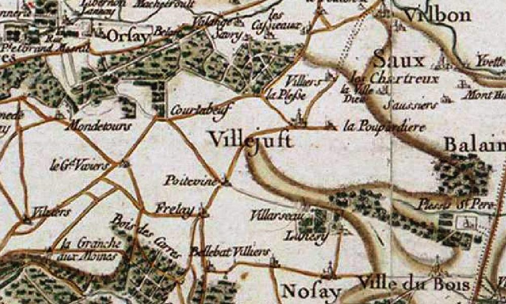 Carte de la région de Villejust selon Cassini